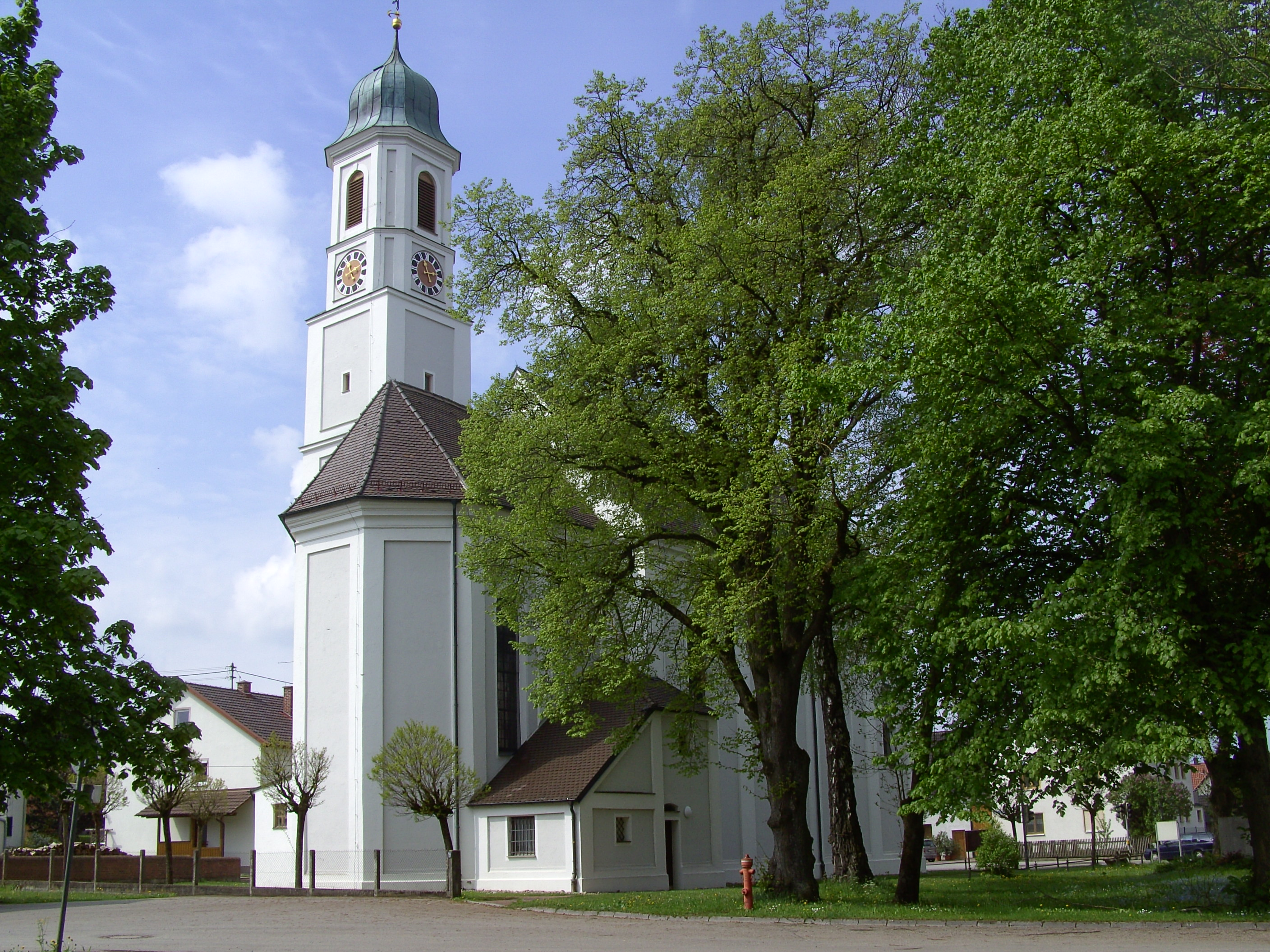 Katholische Pfarrkirche Zu Den Sieben Zufluchten in Affing